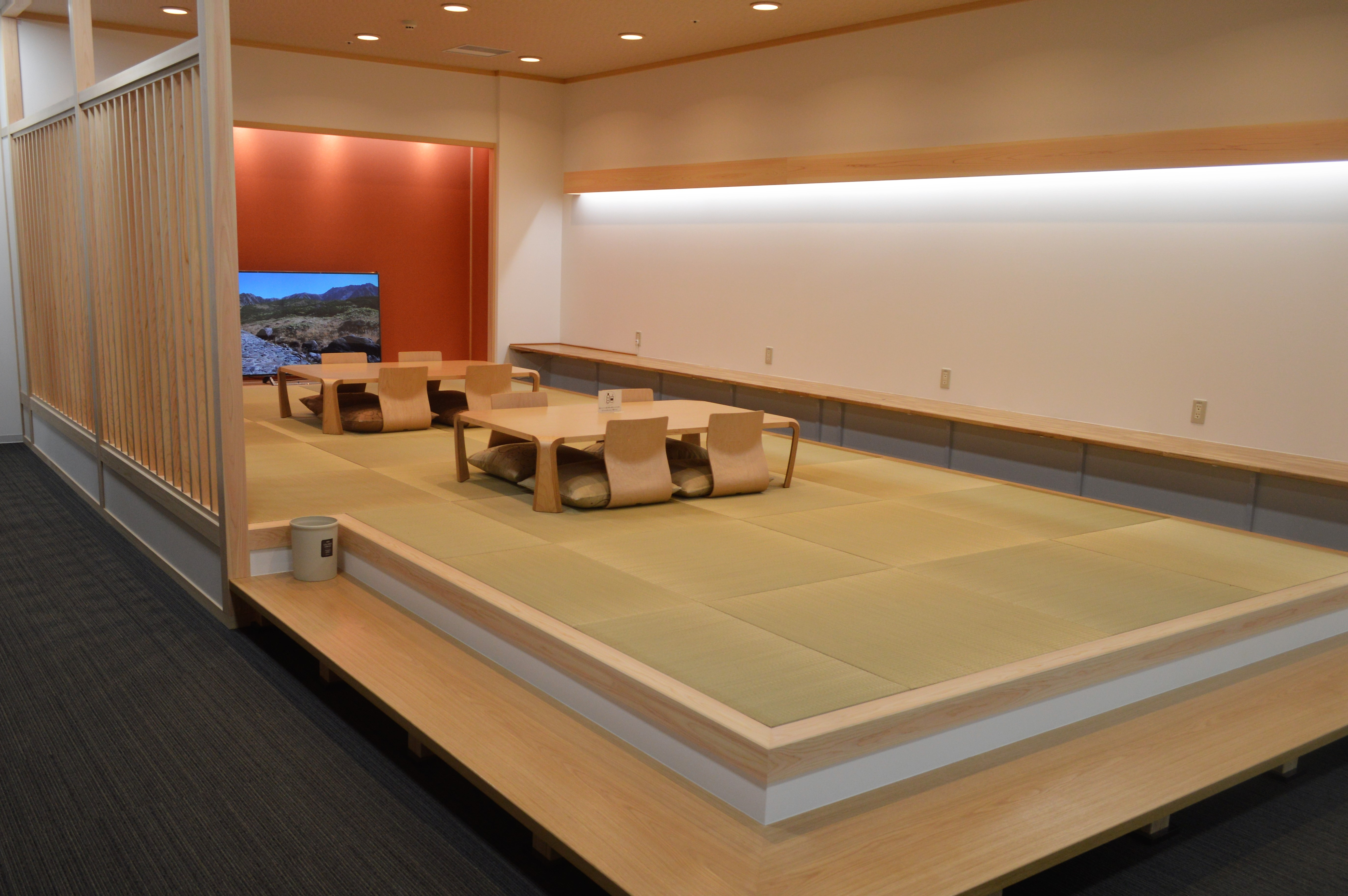 2017年に開館した宮津市立図書館。